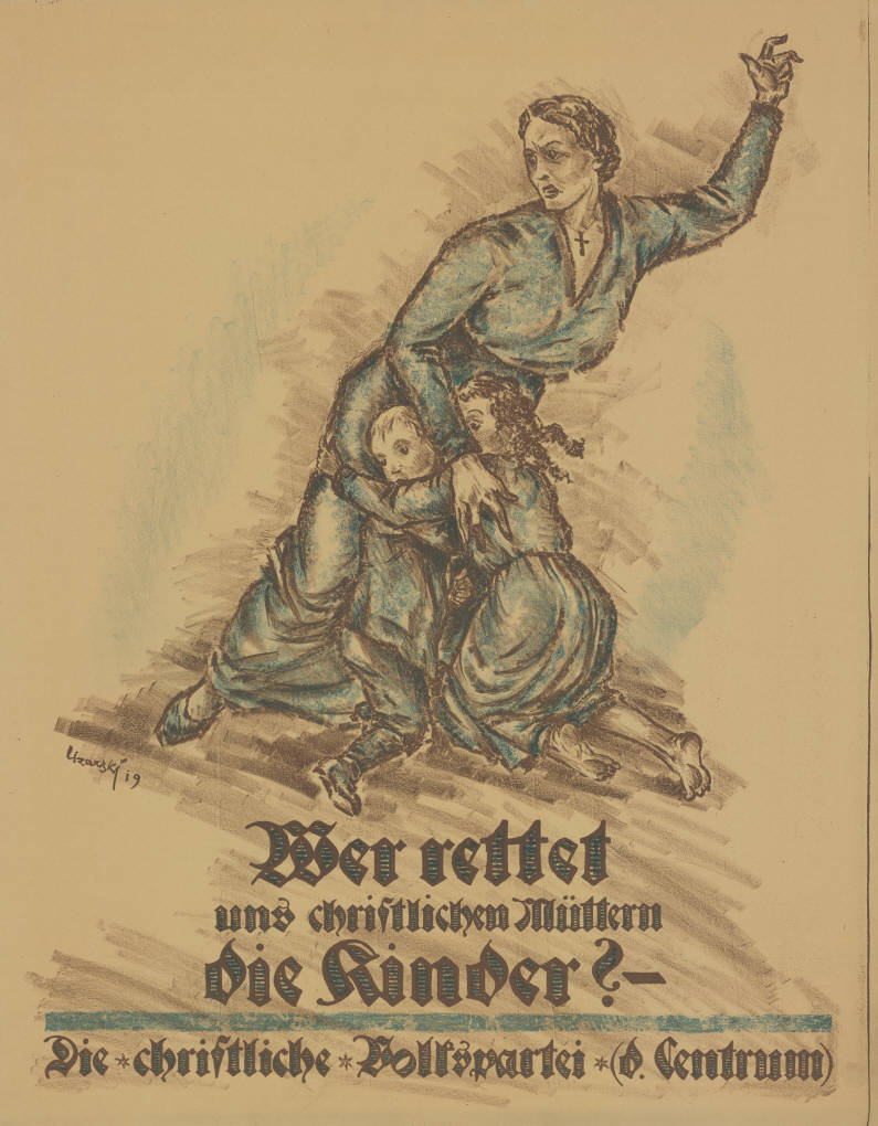 Wer rettet uns christlichen Müttern die Kinder? - Die christliche Volkspartei (d. Centrum) Abbildung: Christliche Mutter beschützt ihre beiden verängstigten Kinder (Grafik) Kommentar: Reichstagswahl 1919 - erstmals konnte auch die weibliche Bevölkerung an einer Reichstagswahl teilnehmen. Plakatart: Motiv-/Textplakat Künstler_Grafiker: Adolf Uzarski (* 14. April 1885 in Ruhrort; † 14. Juli 1970 in Düsseldorf) Objekt-Signatur: 10-043 : 15 Bestand: Plakatsammlung Weimarer Republik/NS-Zeit (10-043) GliederungBestand10-18: Zentrum Lizenz: KAS/ACDP 10-043 : 15 CC-BY-SA 3.0 DE